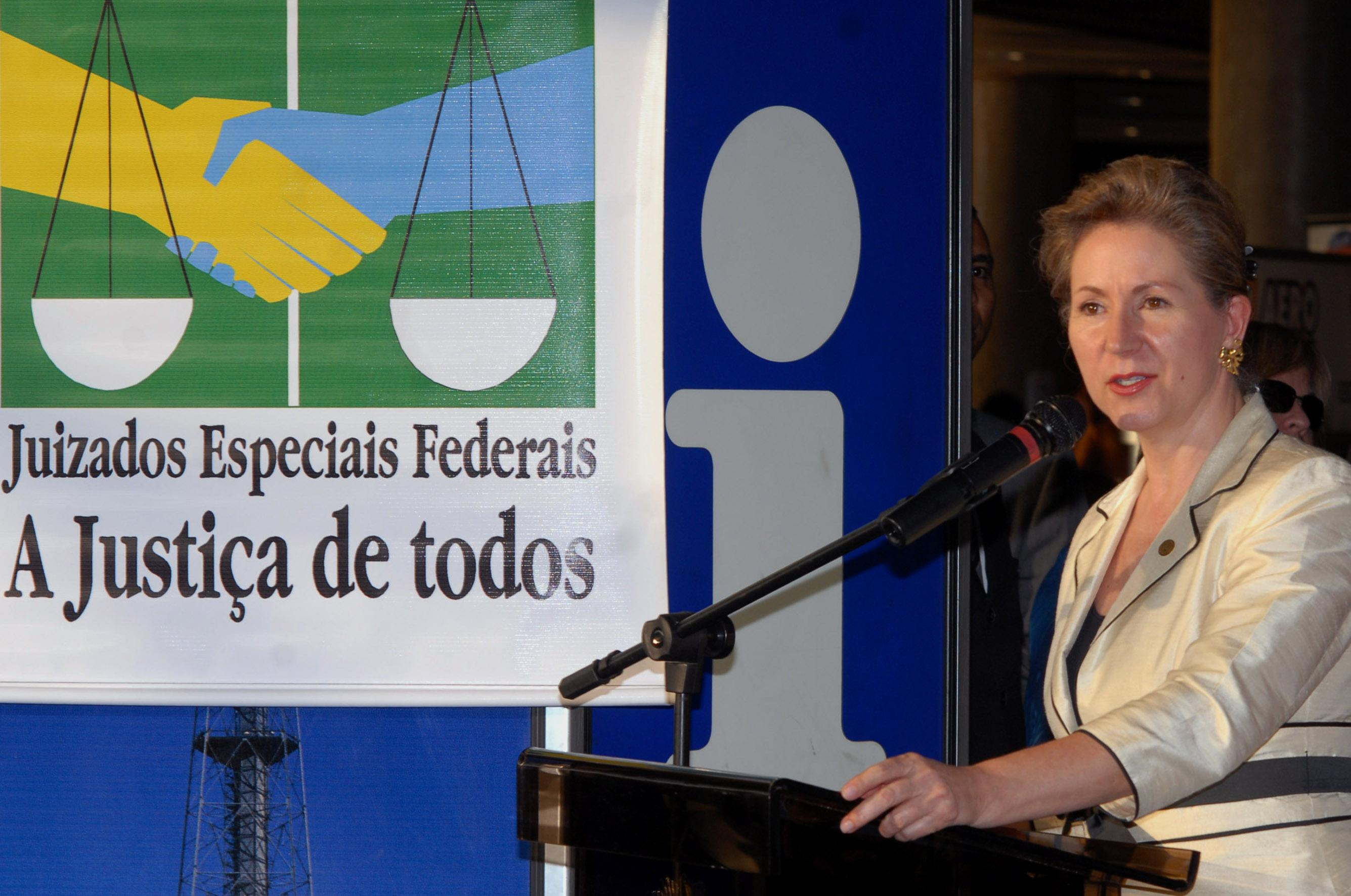 A ministra Ellen Gracie, presidente do STF, inaugura Juizado Especial Federal no Aeroporto JK, em Brasília, Brasil.